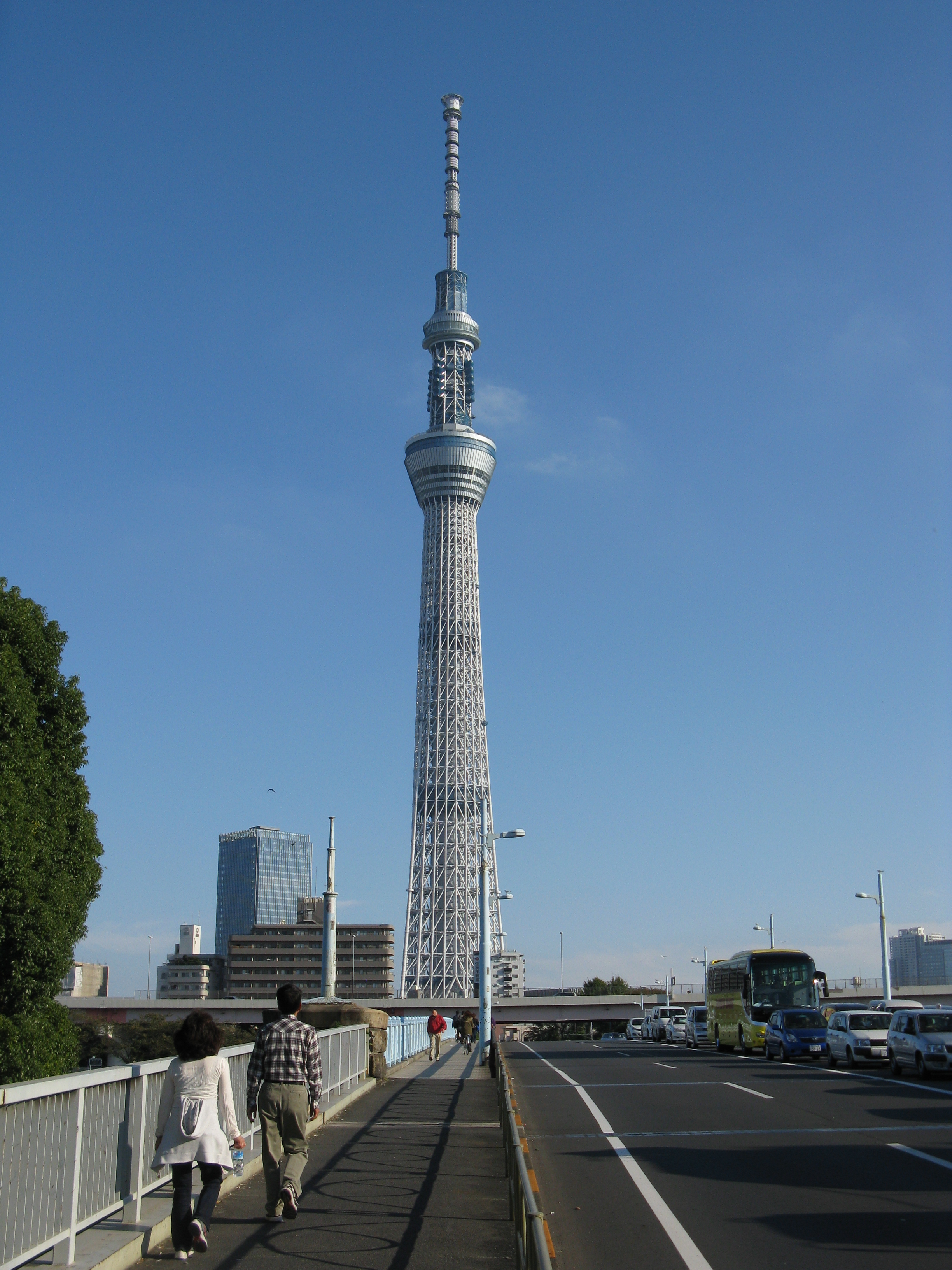 東京スカイツリー